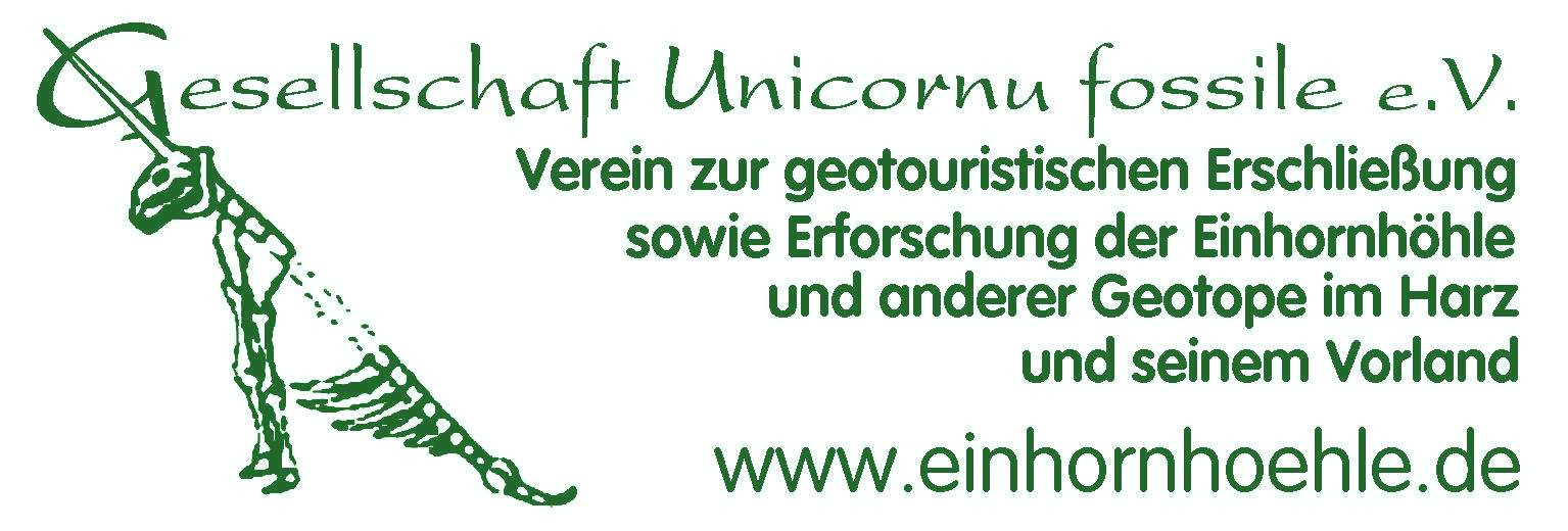 Logo Verein GUf eV